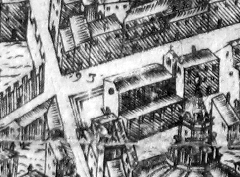 Pianta del buonsignori, dettaglio 093 san michele bisdomini